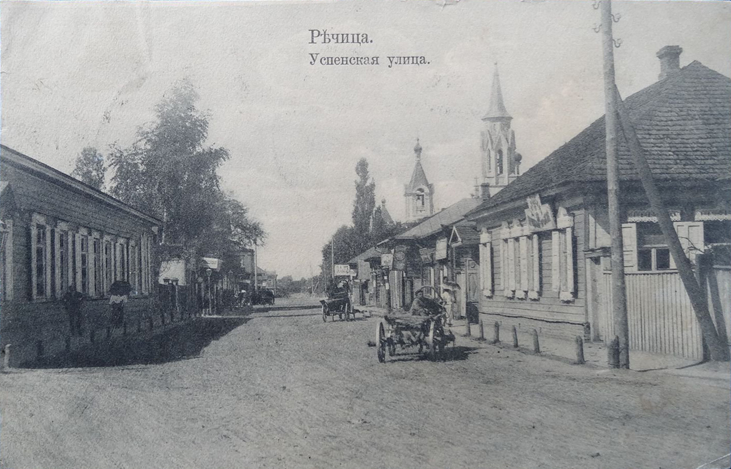 Беларуская (тарашкевіца): Рэчыца (Rečyca), вуліца Прабойная (vulica Prabojnaja) у бок скрыжаваньня з Андрэеўскай (vulica Andrejeŭskaja)